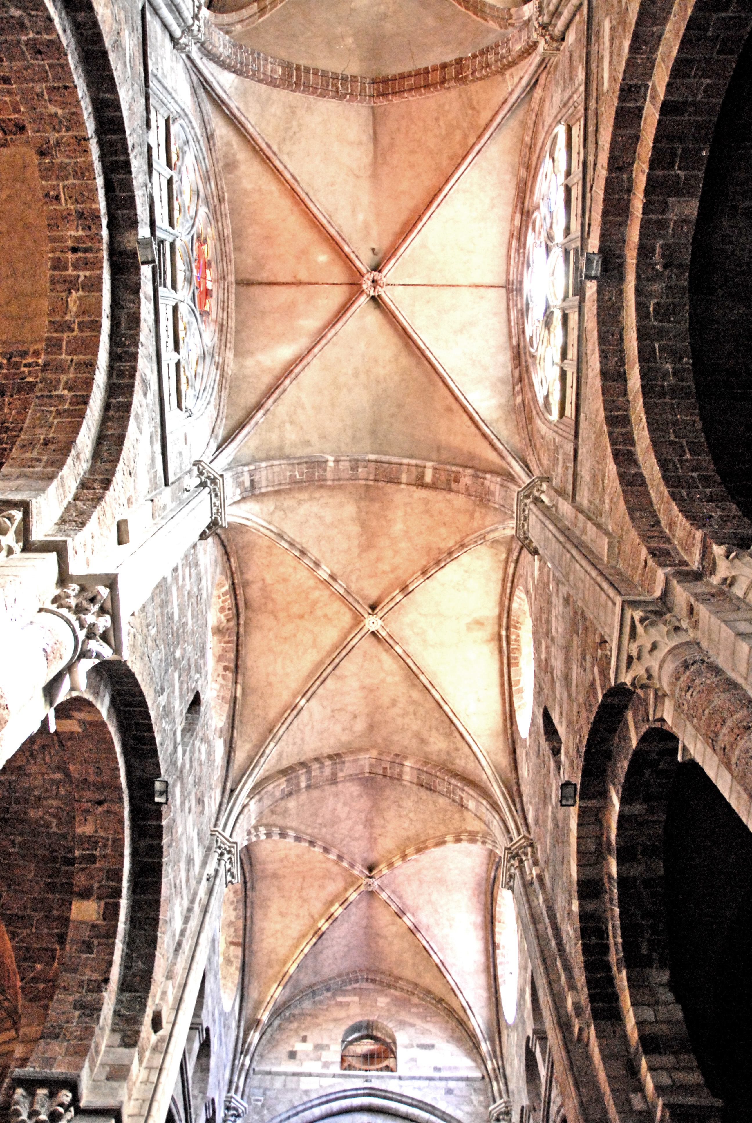 Sain-Julien Brioude, Mittelschiffgewölbe, Joche 2-5